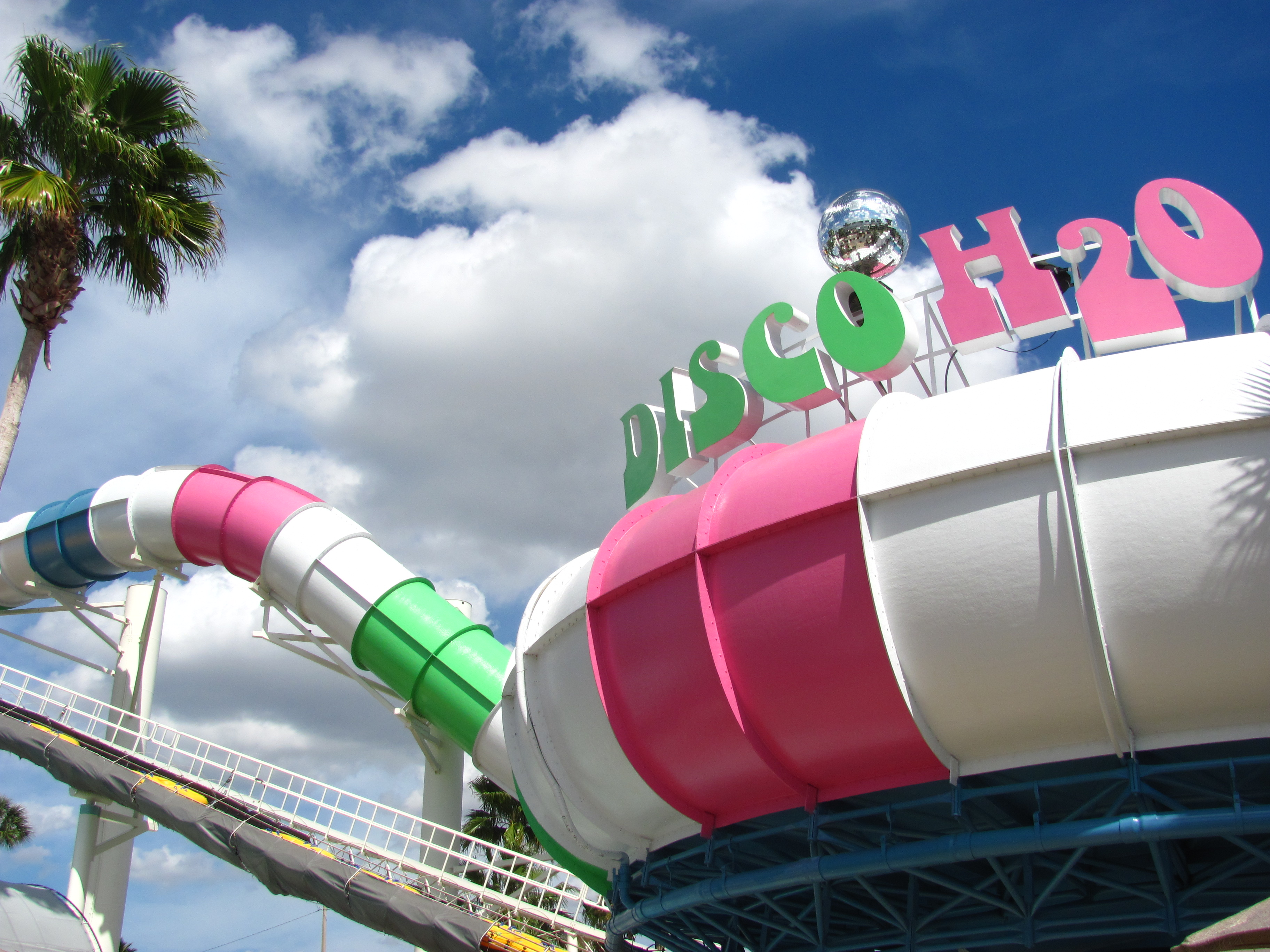 Disco H20